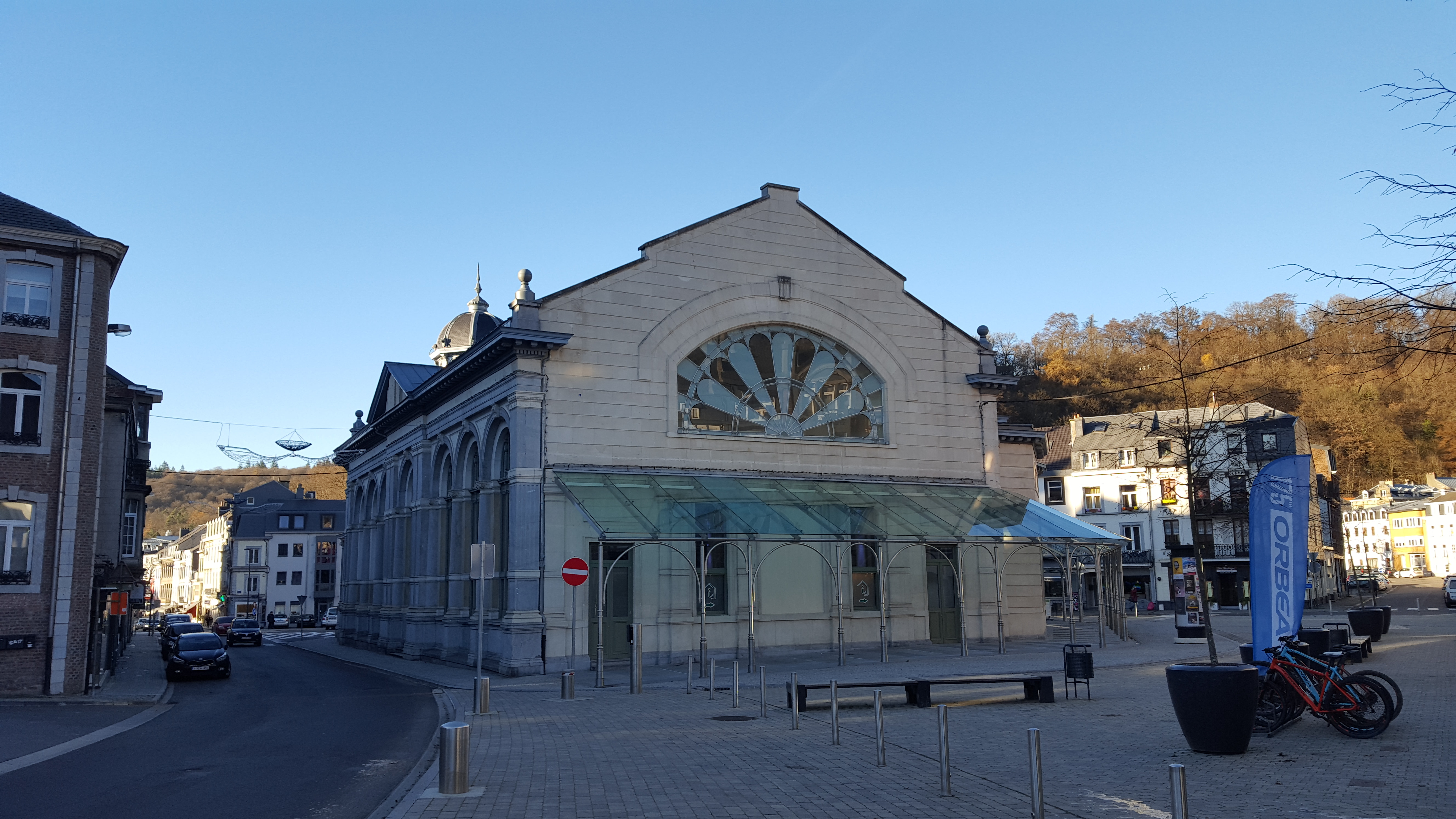 Pouhon Pierre-le-Grand, Spa, Belgique